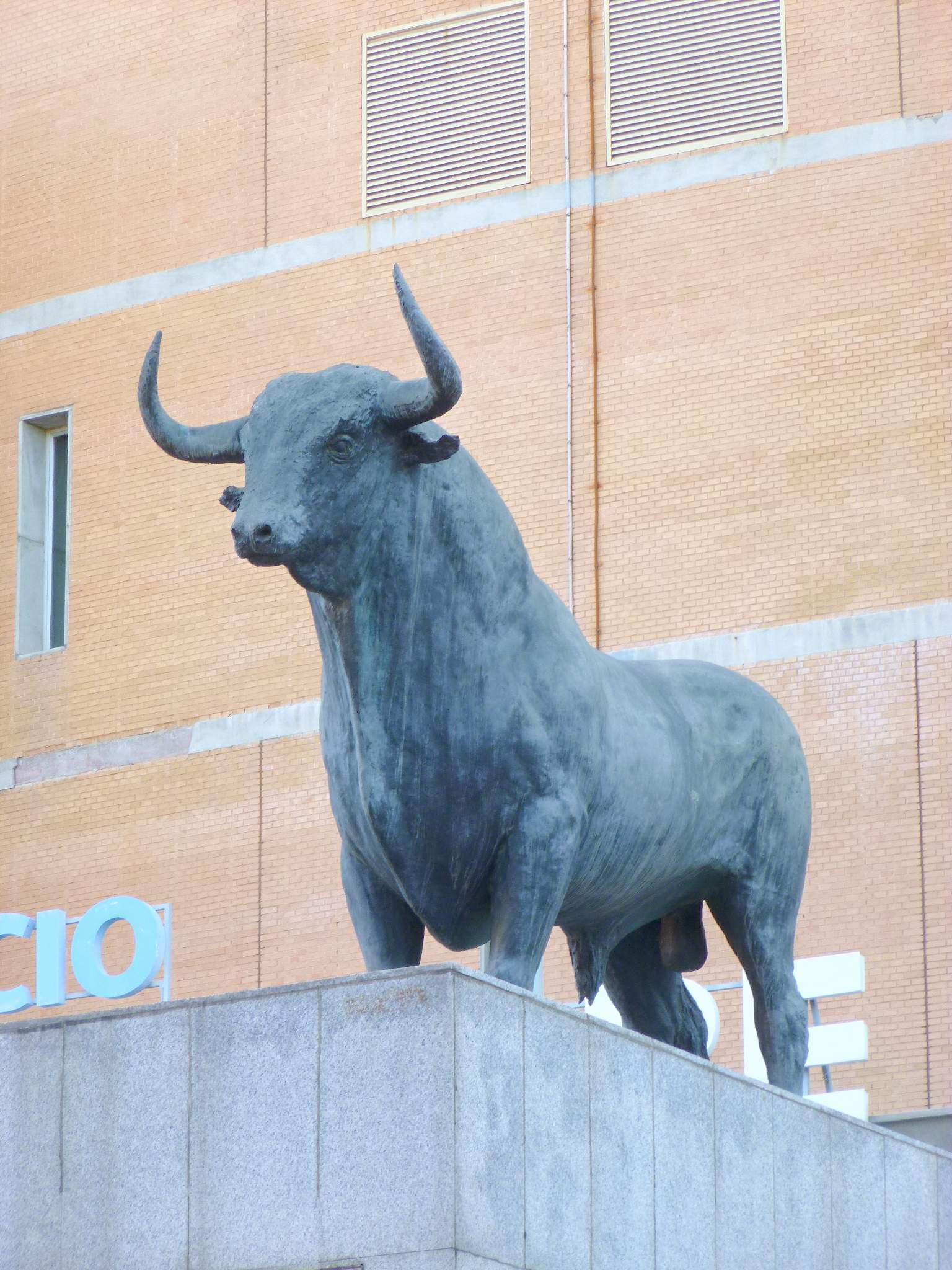 Palacio de Vistalegre (Carabanchel, Madrid)